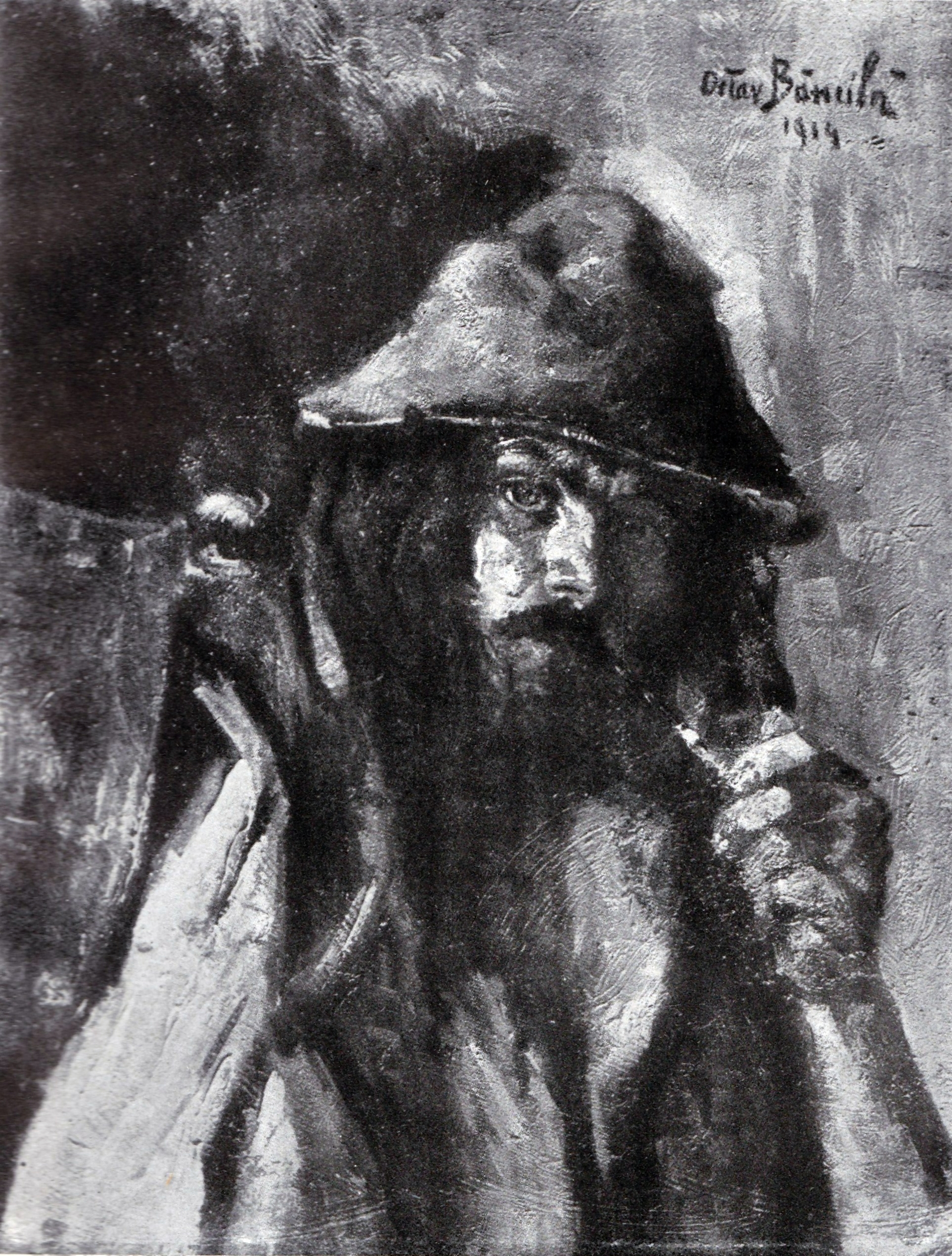 Stănică